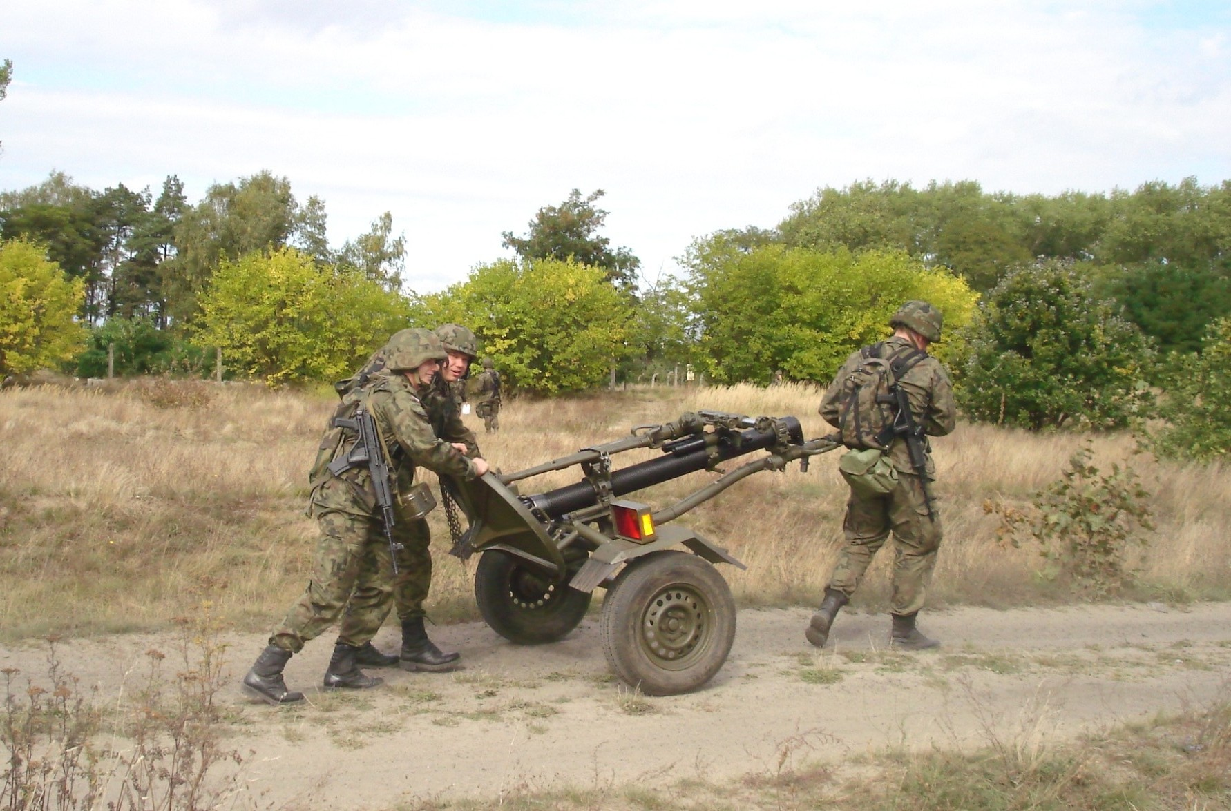 Żołnierze z 2bzmot - obsługa moździerza